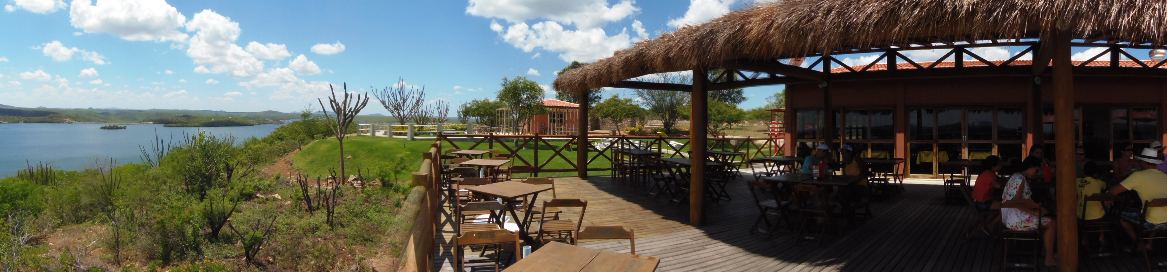 A beleza do sertão alagoano em Xingó com o Velho Chico em seu leito.